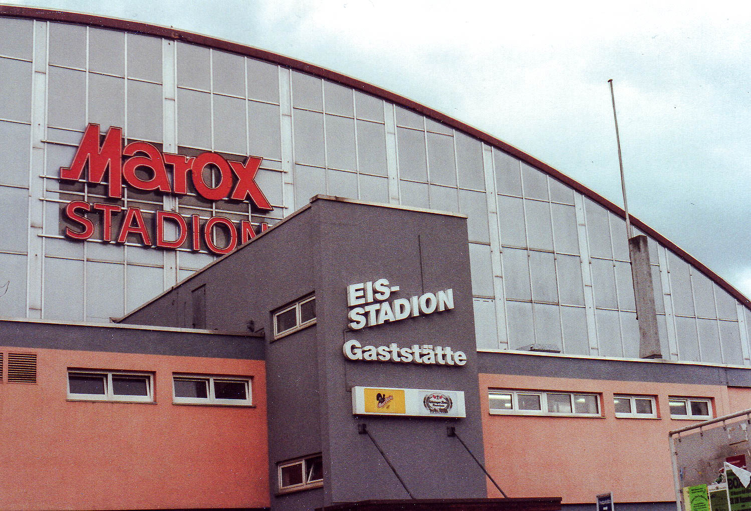 Eisstadion des damaligen EV Rosenheim (1992)